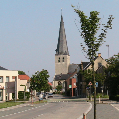 Foto de mi farita dum biciklado, sabate la 28-an de majo 2005. Reduktis formaton al 400x400.